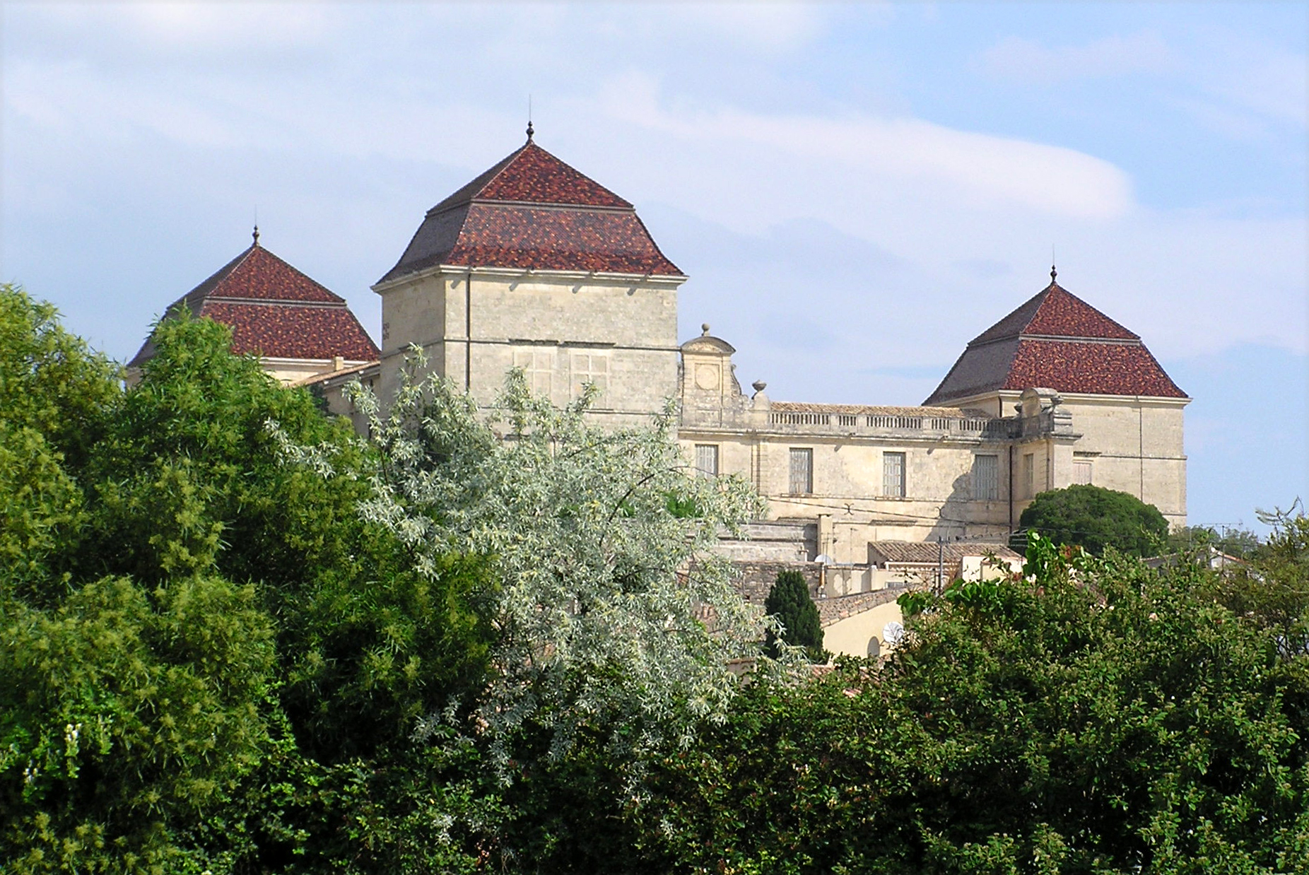 Château de Castries (Hérault 34)